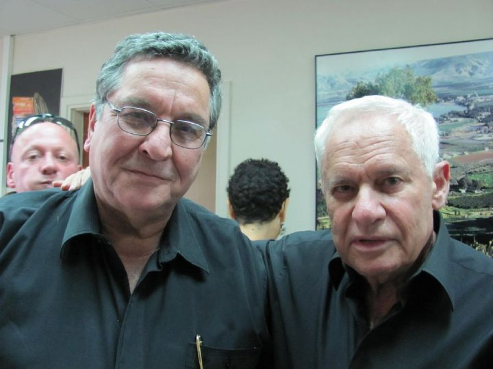 גדעון רייכר ויעקב אחימאיר